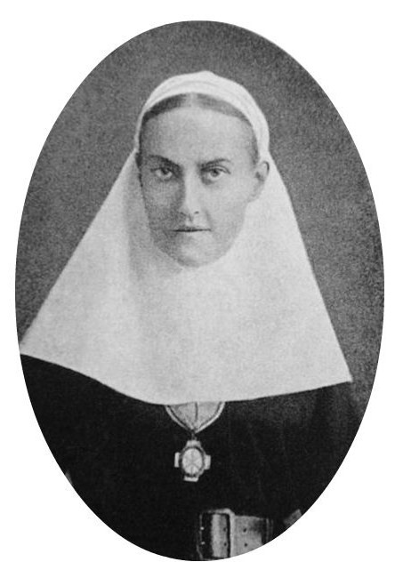 Ольга Ефимовна Путятина (1848—1890), фрейлина